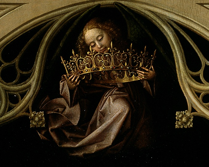 Esta obra, conocida como la Madonna Durán, representa a la Virgen María llevando sobre sus rodillas al Niño Jesús.